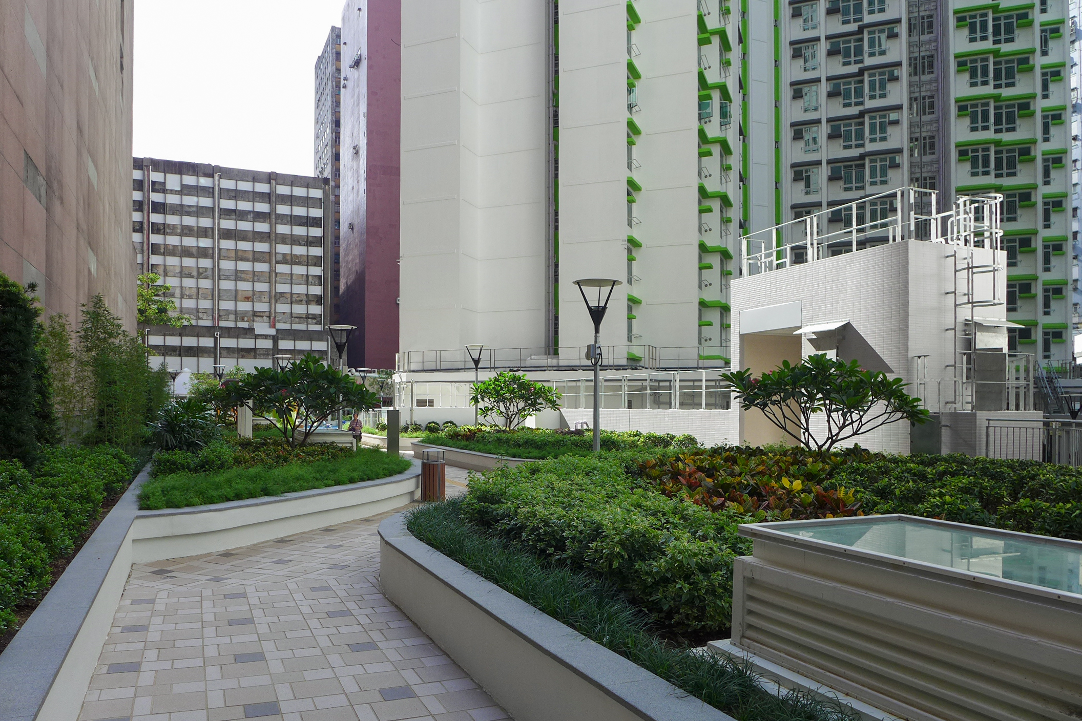 Sheung Chui Court Podium Garden